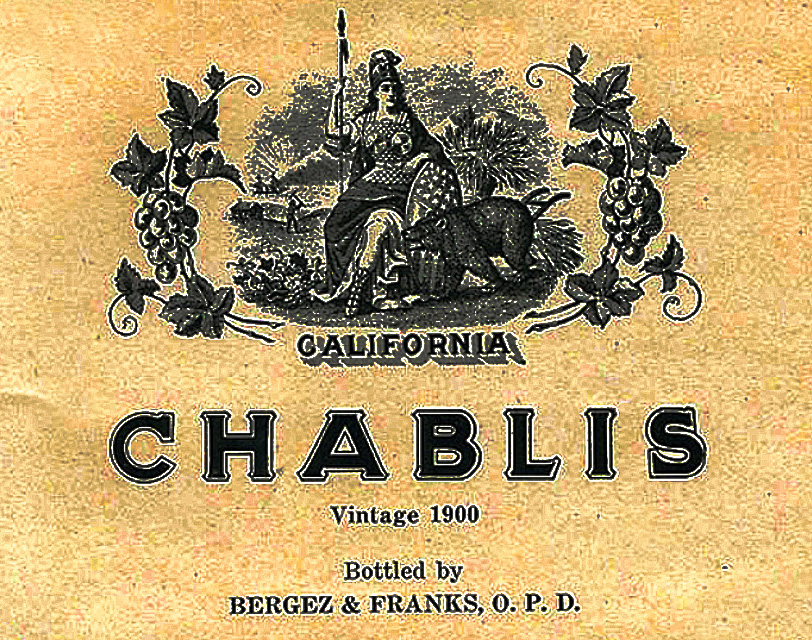 étiquette d'un vin californien s'attribuant l'appellation Chablis en 1900